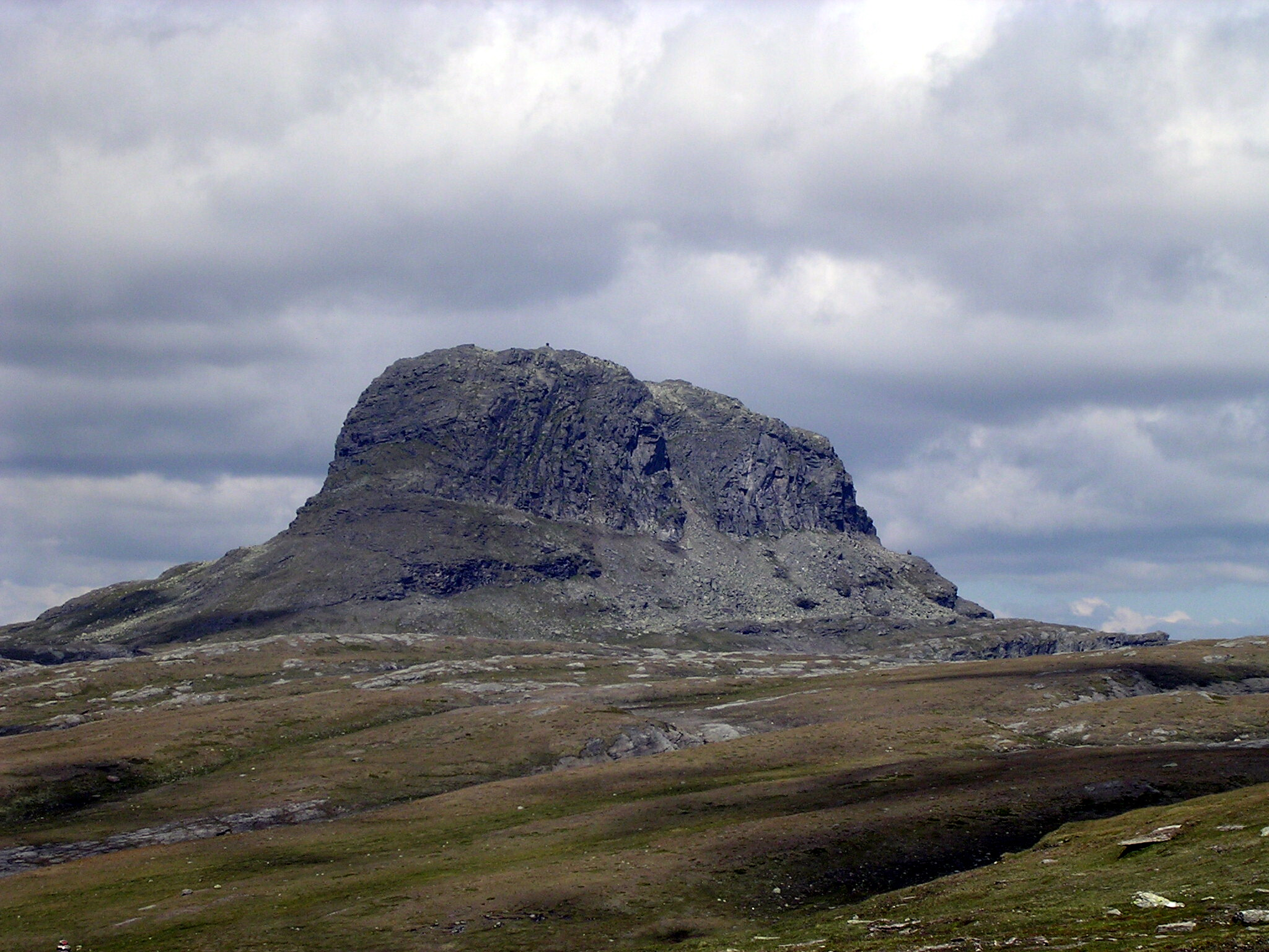 Privat bilde tatt sommeren 2006 på Hardangervidda. Tatt med et NIKON kamera og lastet ned under lisensen Public Domain. Opphavsretteieren er norsk.